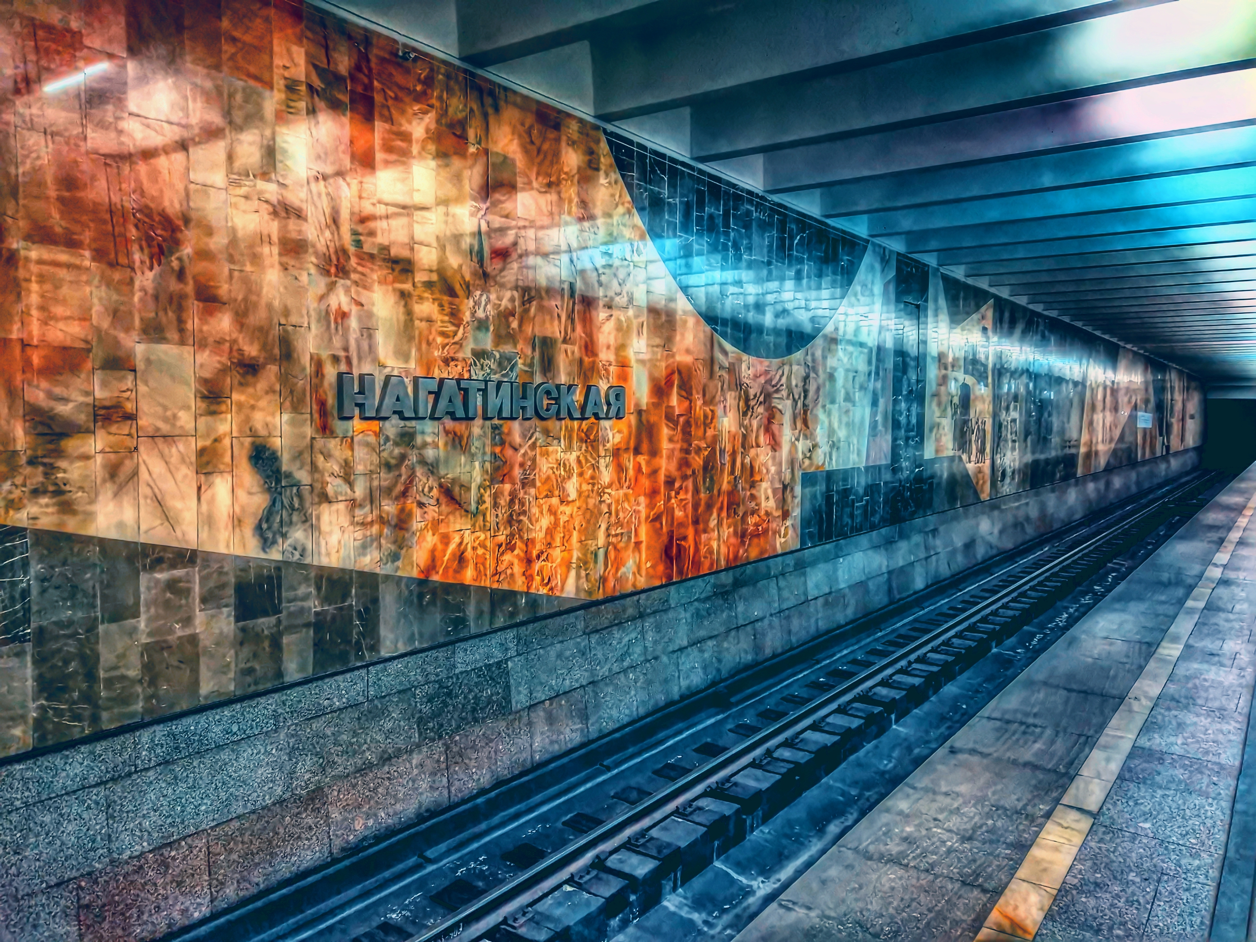 Станция метро Нагатинская